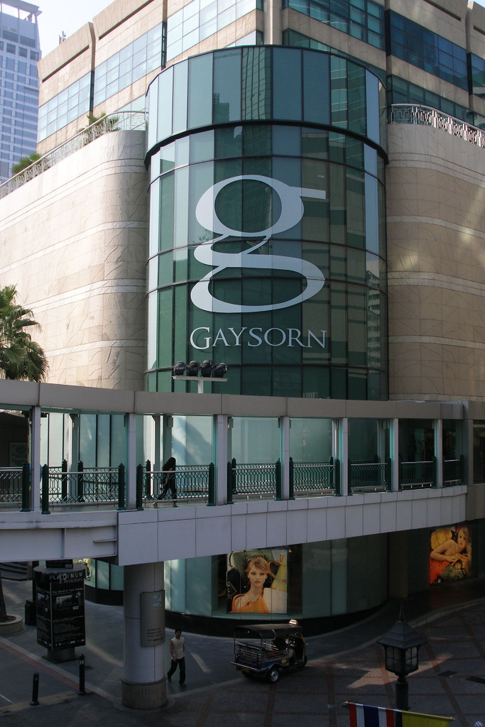 Gaysorn